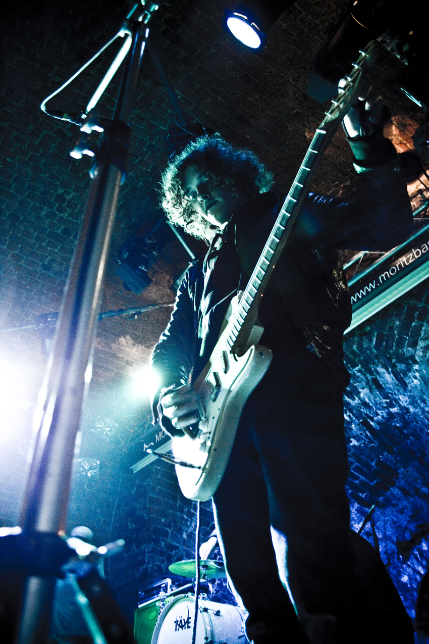 Jennifer Rostock performing